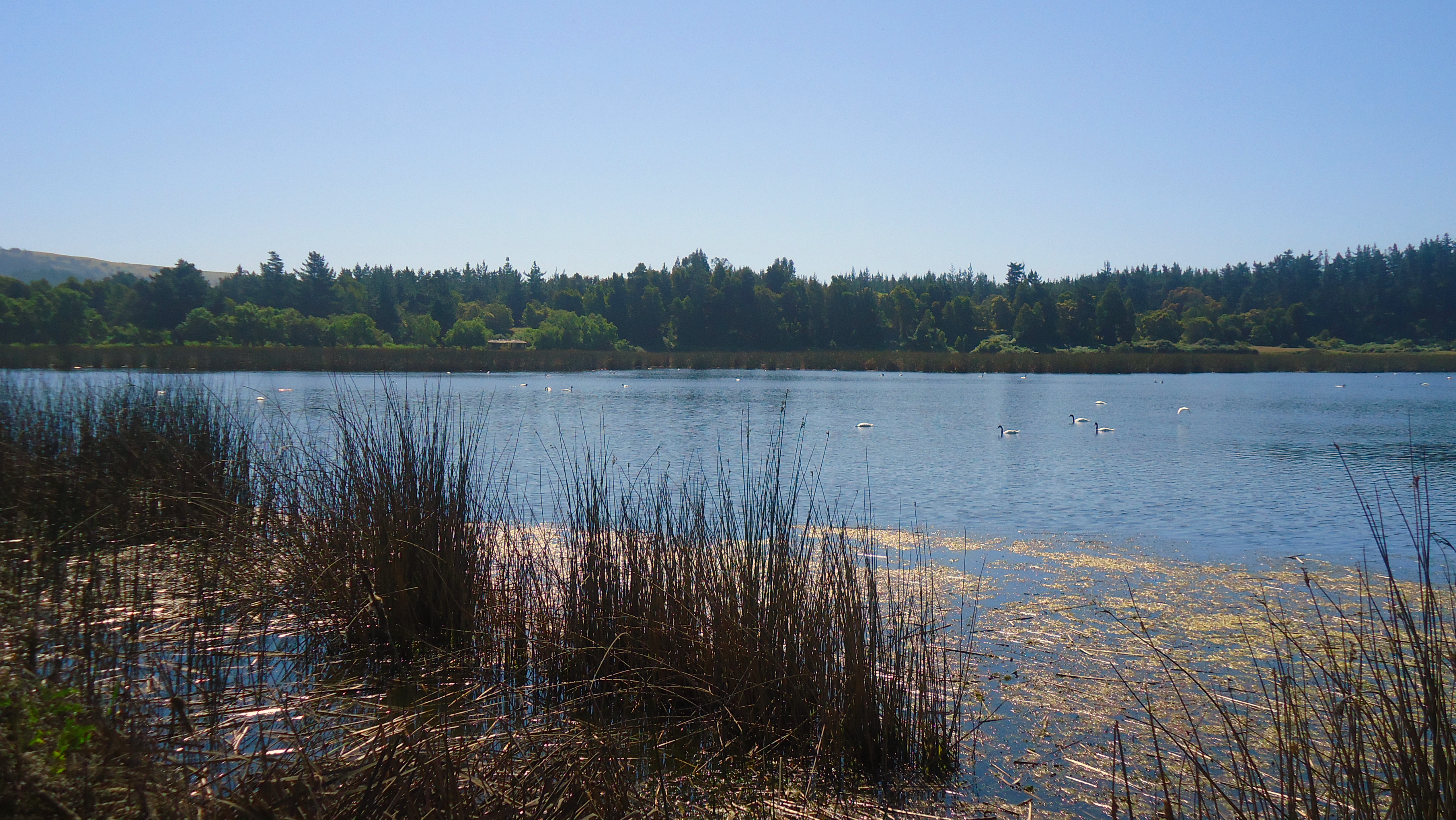 Laguna Torca This is a photo of a national monument in Chile: 646